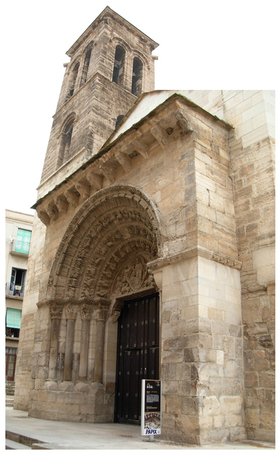 Puerta principal y torre de la I.de la Magdalena Tudela Navarra España